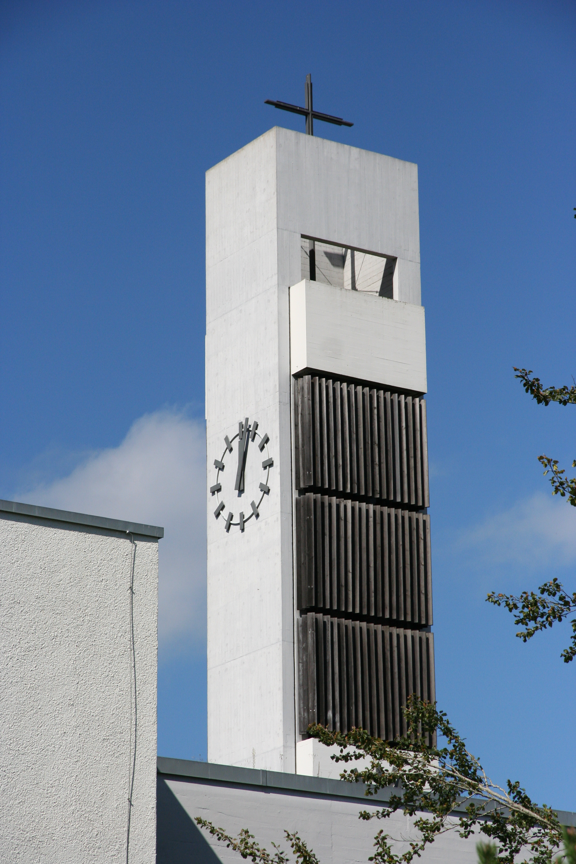 röm.-kath. Pfarrkirche Eschlikon TG